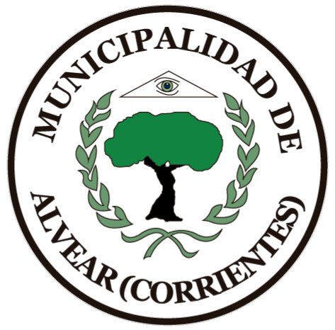 Escudo de Alvear, en la provincia de Corrientes.